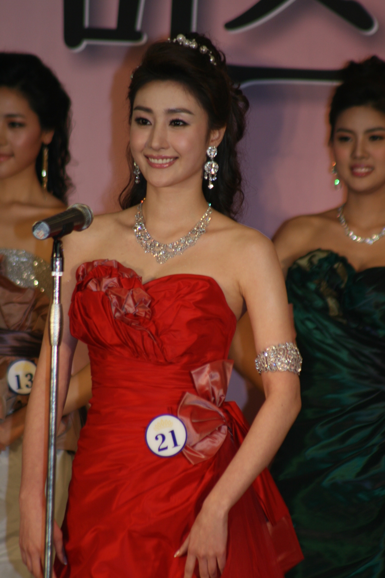 2009 미스코리아 서울 선 박시원 드레스 심사